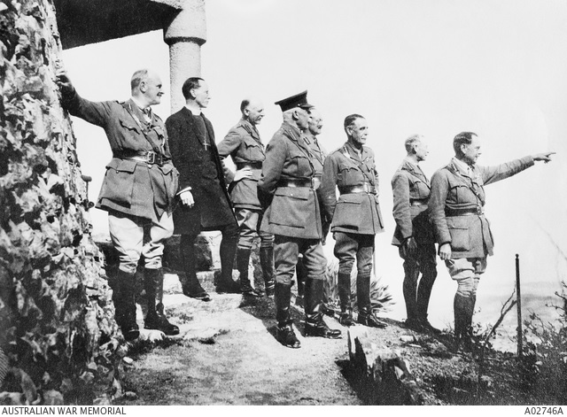 פיליפ צ'טווד, מפקד הפעולה לכיבוש יריחו, מסביר לפיקוד הבריטי את מהלכי הקרב. מימין לשמאל: אדמונד אלנבי, הבישופ של ירושלים, לוטננט קולונל מוראי, המזכיר הצבאי של אלנבי, מייג'ור ג'נרל שי, סיר בלפין, גנרל הנרי שובל, צ'טווד